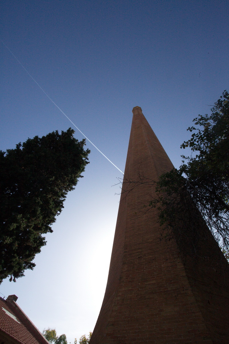 Edificis del complex de l'Antiga fàbrica Can Batlló al carrer Urgell de Barcelona. Interior de la Xemeneia